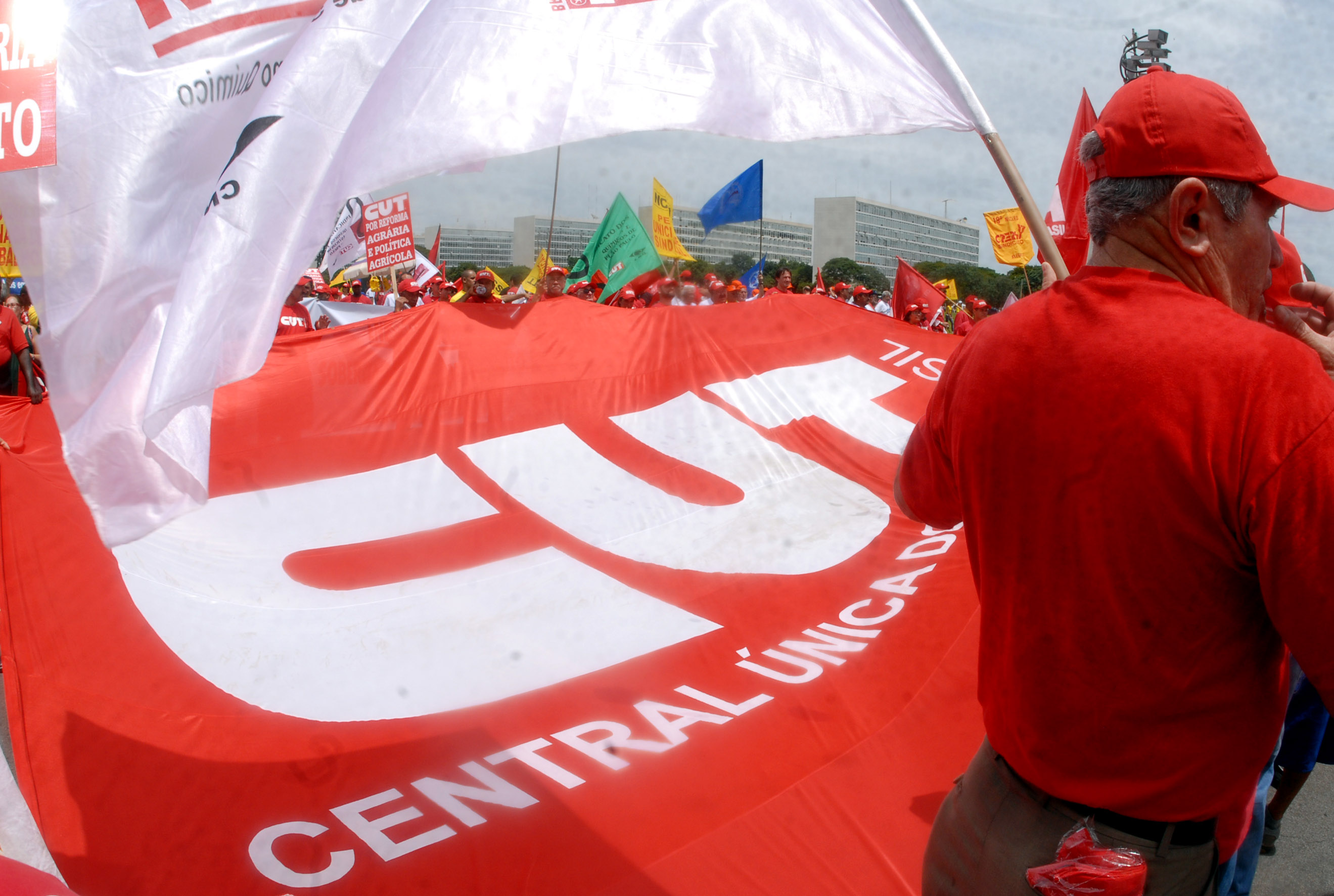 Manifestação da CUT em Brasília